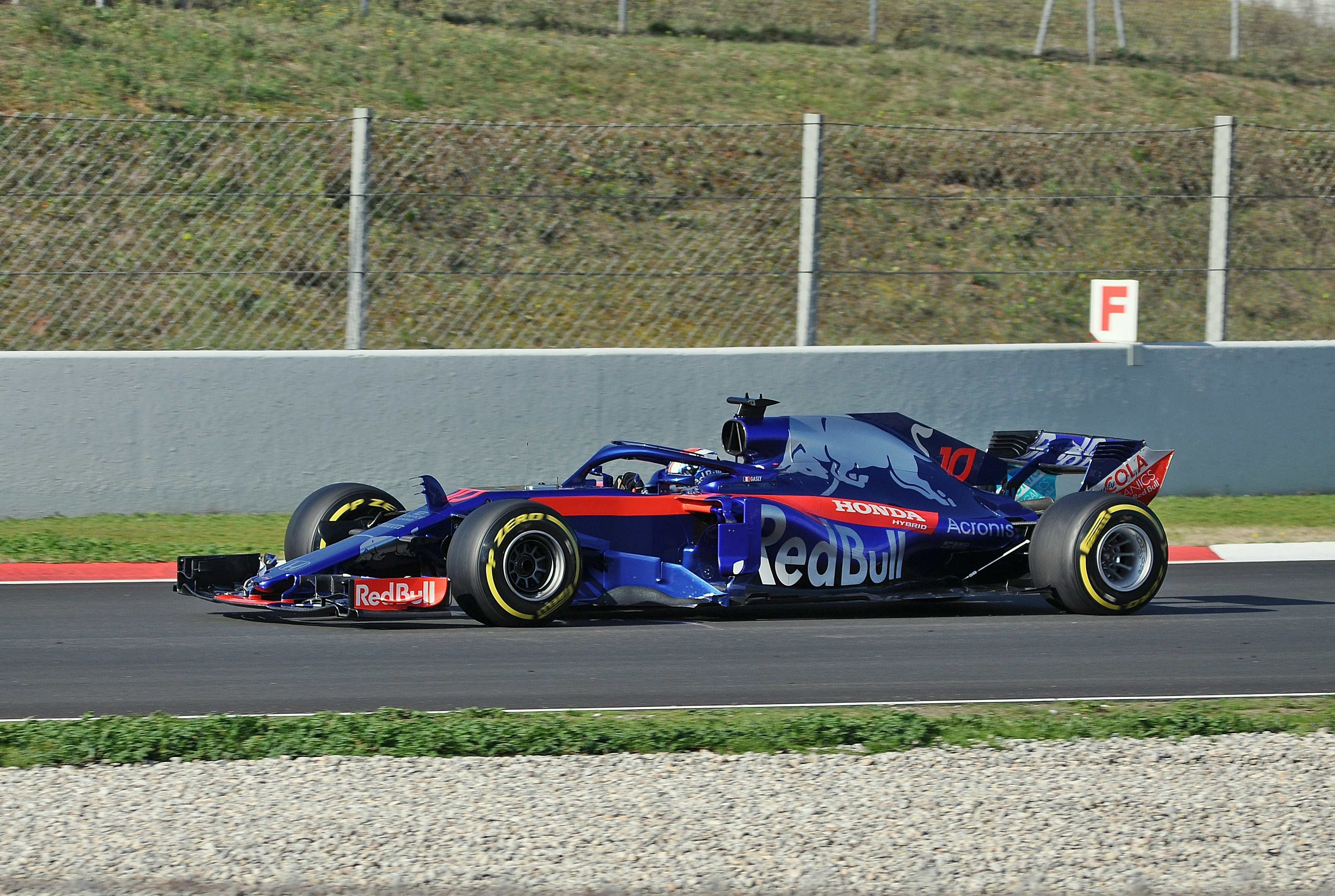 Toro Rosso STR13